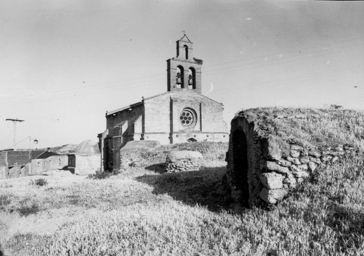 Iglesia - Castronuño (Valladolid) - Álbum 200 x 140 - Fotografía. Papel 125 x 85 B/N